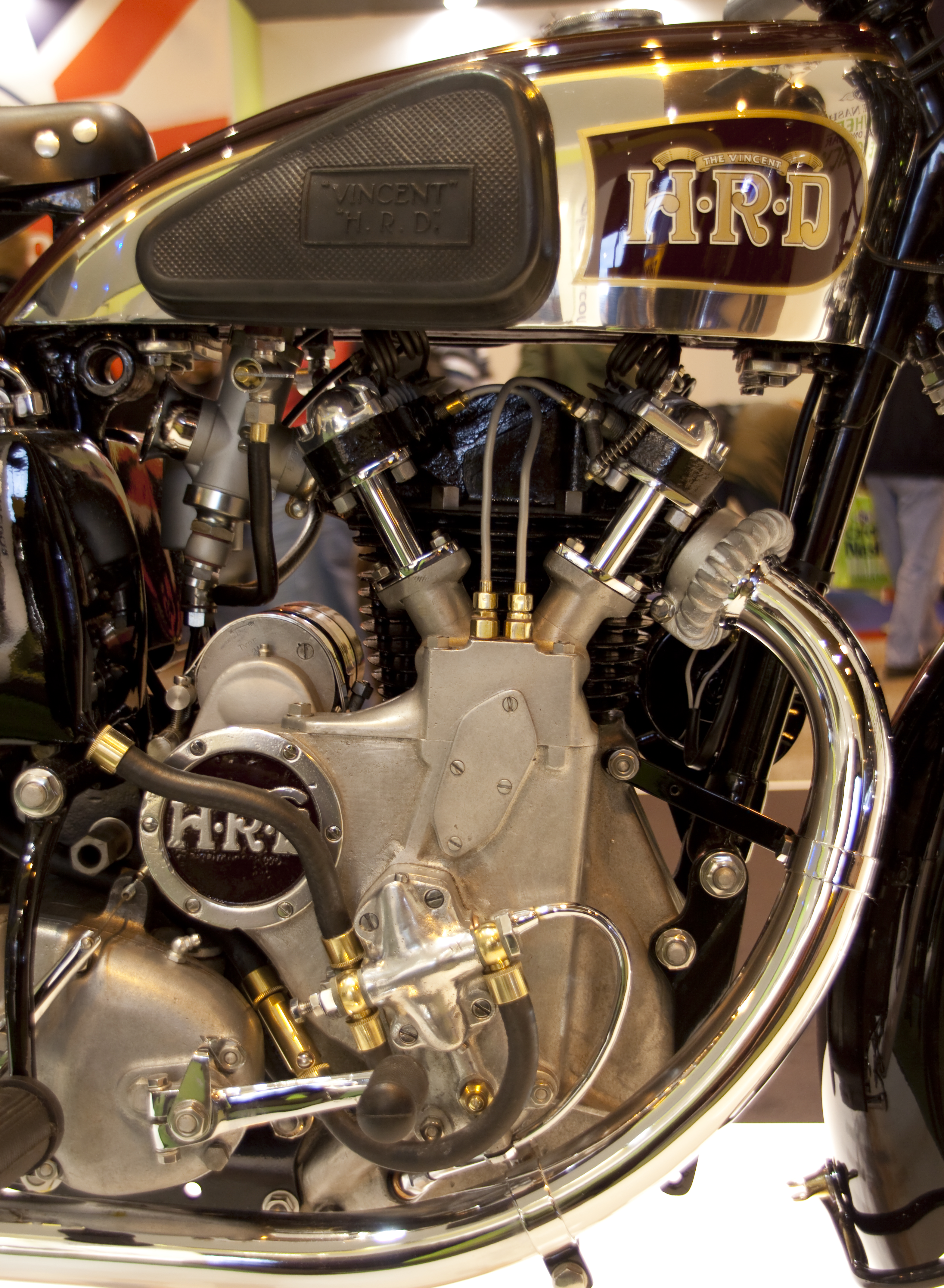 Vincent HRD